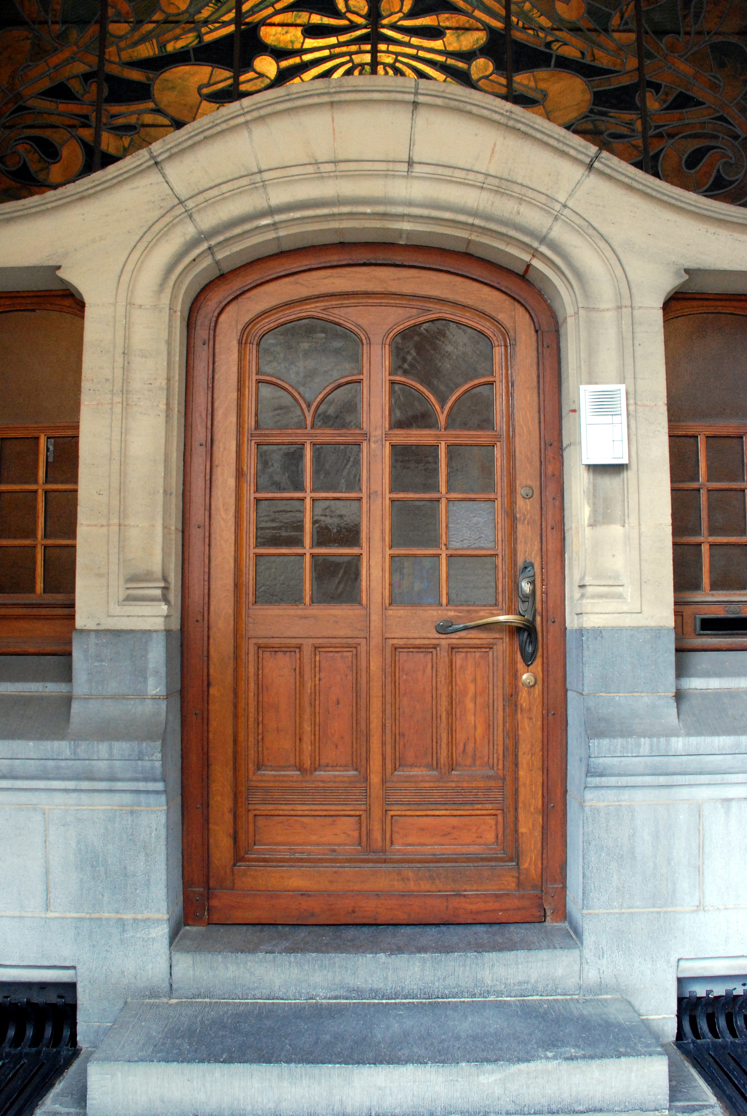 Belgique - Bruxelles - Hôtel Otlet